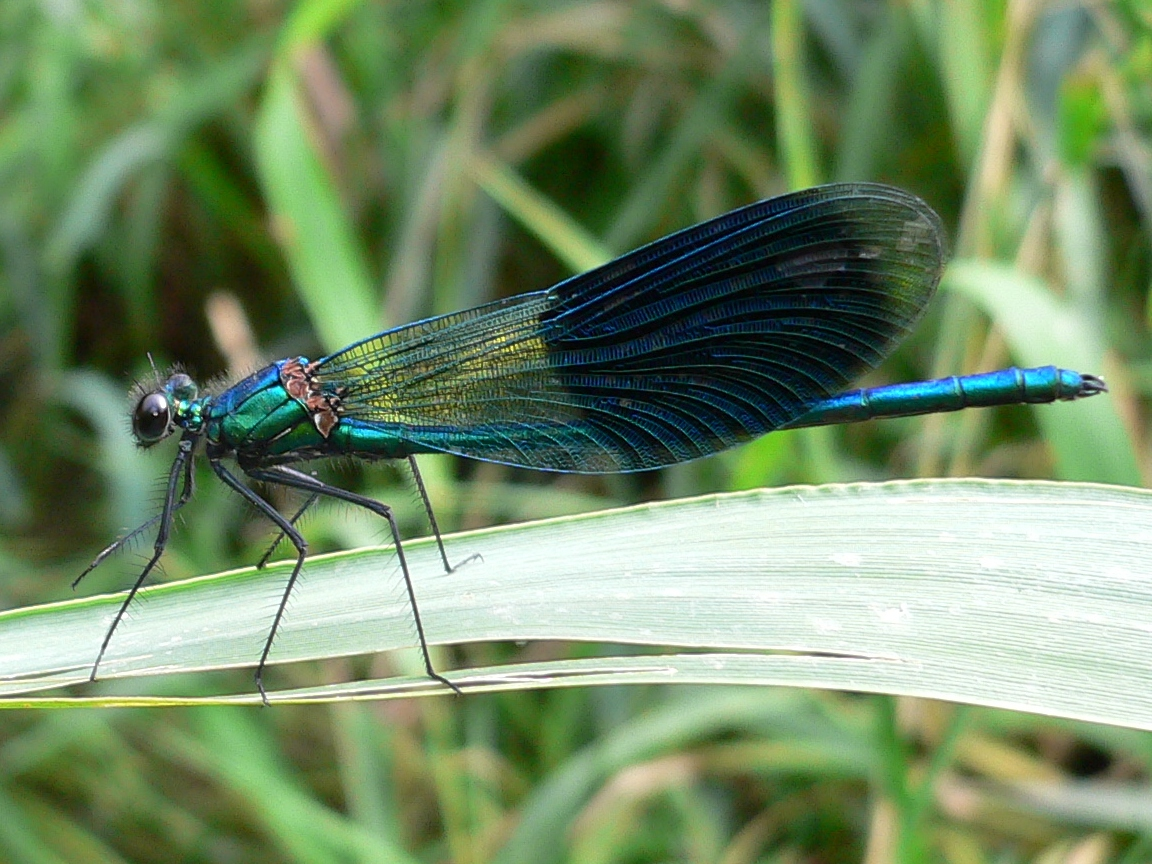 Haßloch (Pfalz), Germany – Gebänderte Prachtlibelle (Calopteryx splendens), Männchen / male Banded Demoiselle (Calopteryx splendens)